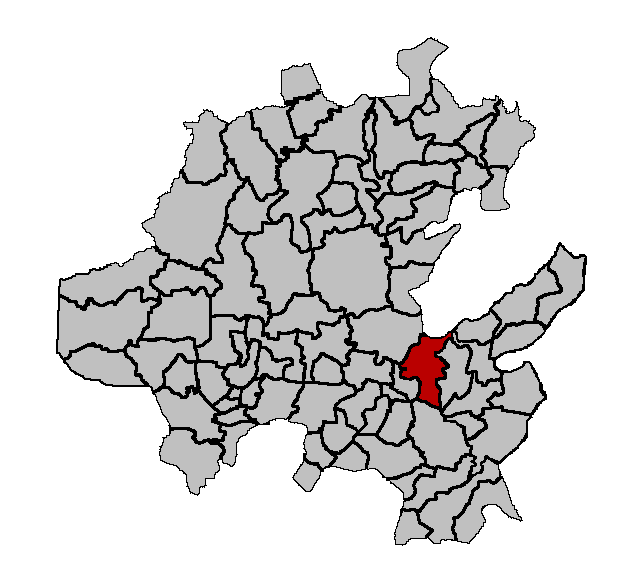 Mapa de ubicacion de Huasca de Ocampo,Hidalgo